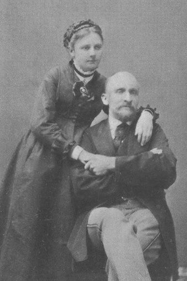 Беларуская (тарашкевіца): Аляксандар Ельскі з дачкой Алесяй